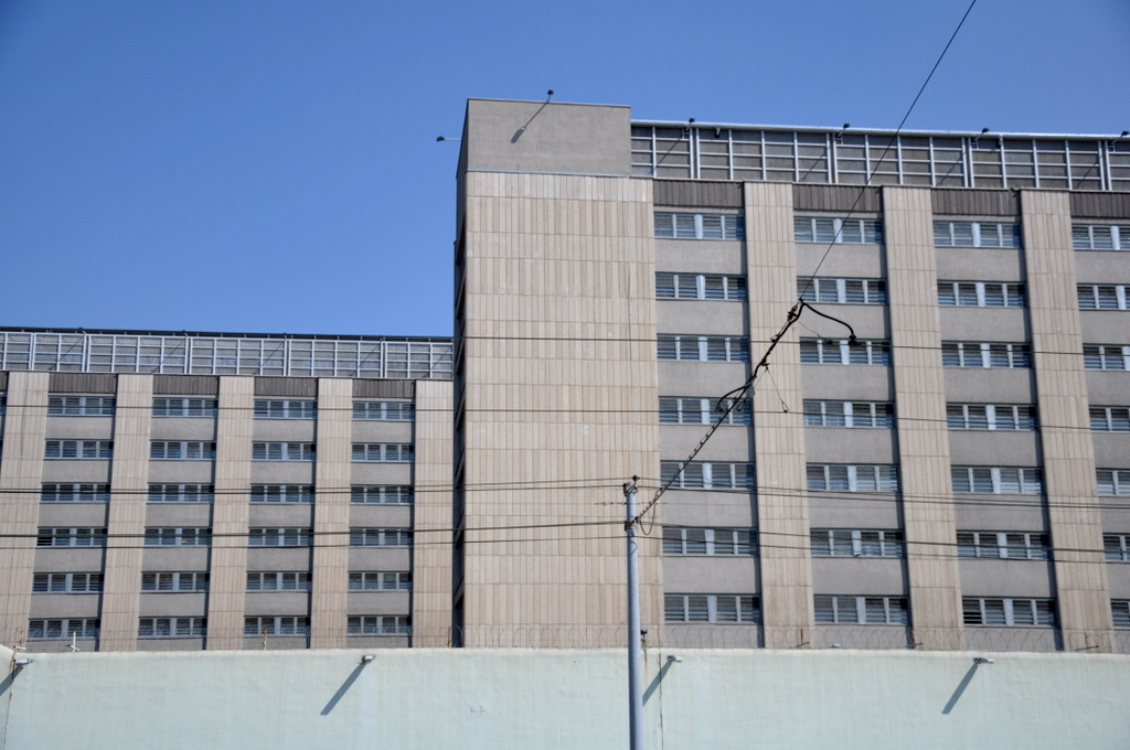 Fővárosi Büntetés-végrehajtási Intézet - Prison Complex in Budapest District X